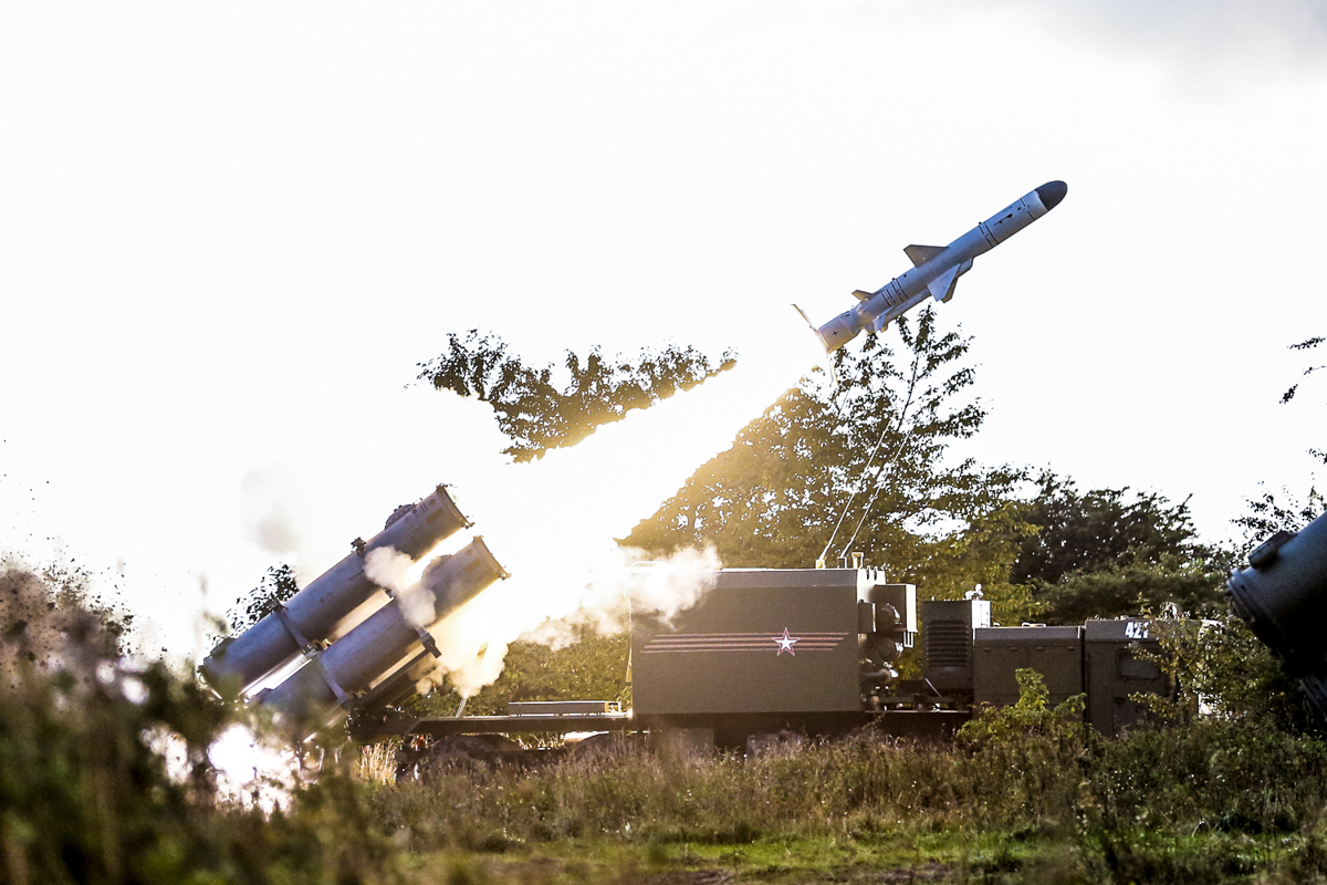 Боевые стрельбы ракетчиков Балтийского флота в рамках учения «Запад-2017».